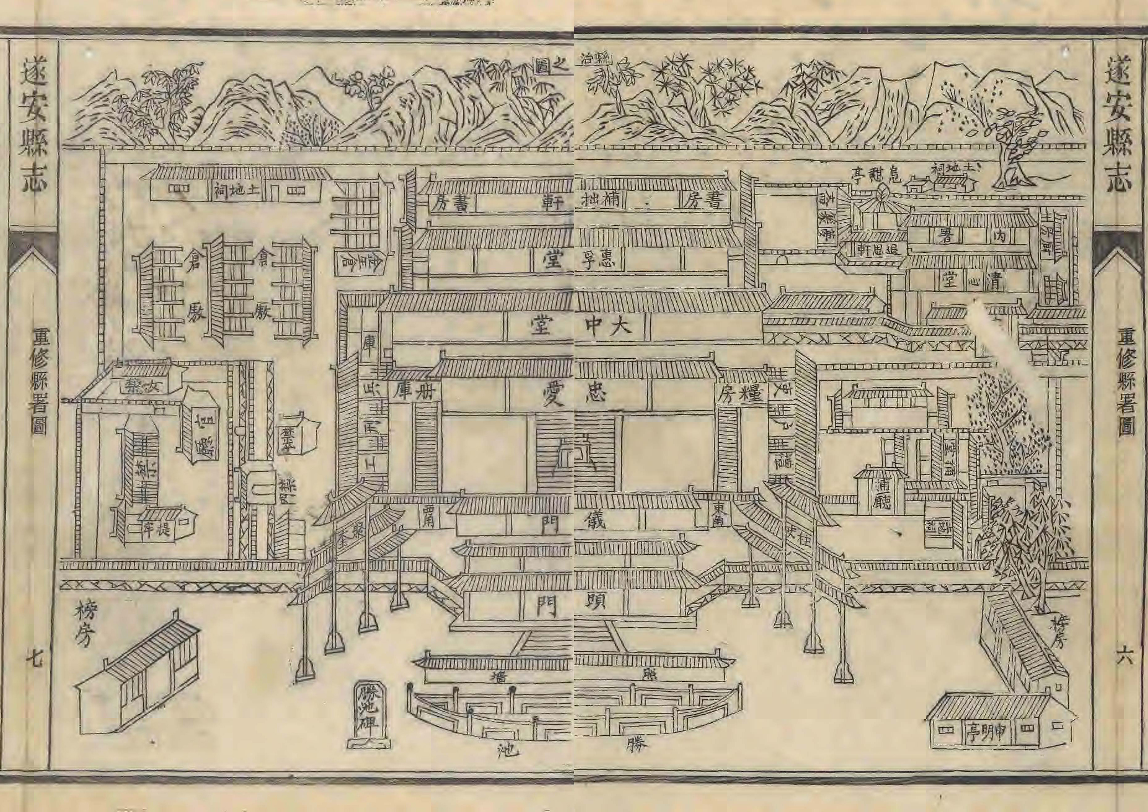 清光绪十六年（1890）《遂安县志》重修县治图。